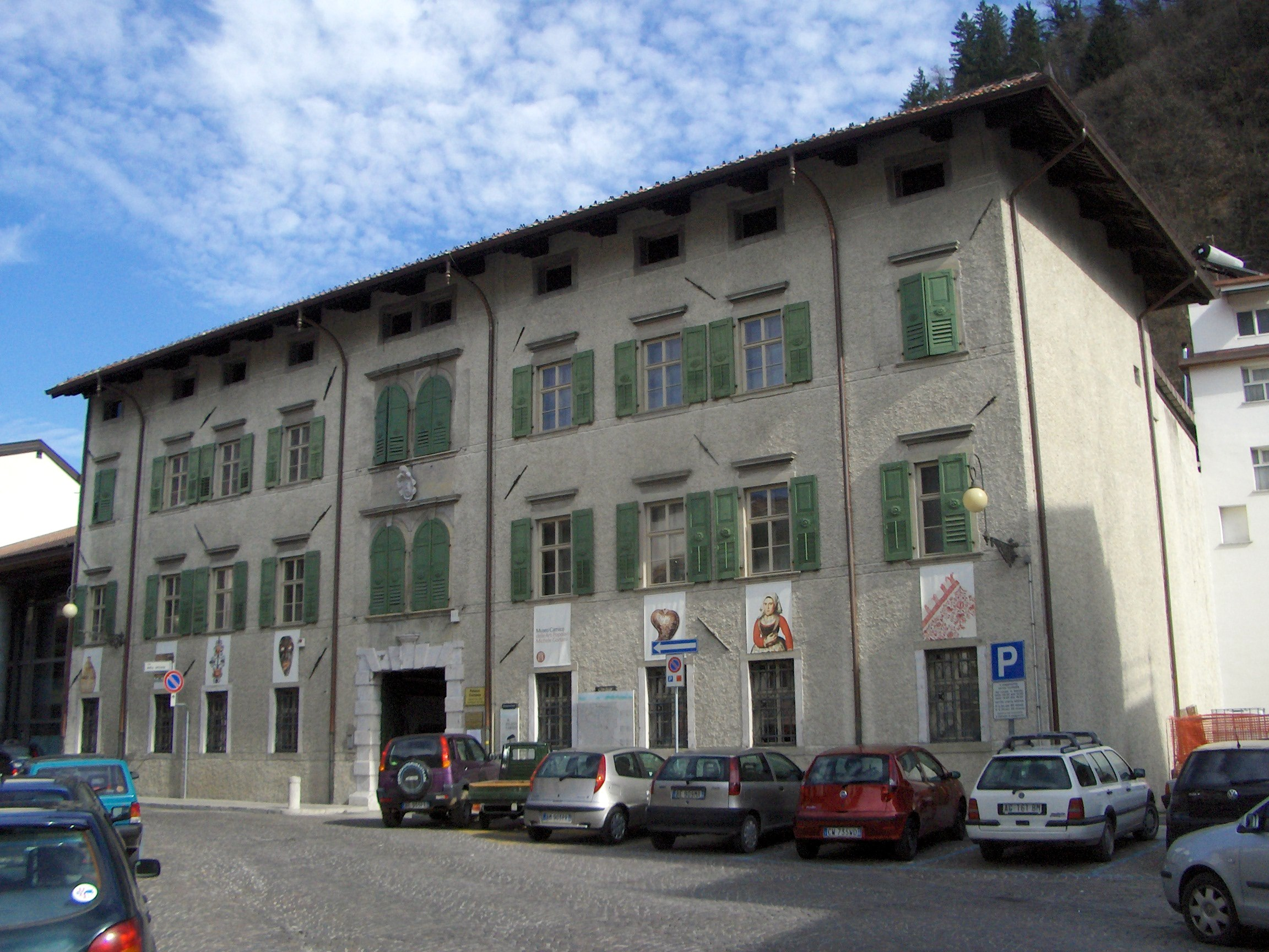 Sebi1